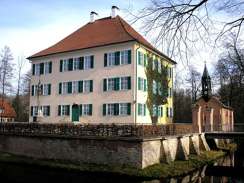 Schloss Unterwittelsbach bei Aichach (Landkreis Aichach-Friedberg, Bayerisch-Schwaben). Gesamtansicht. Eigene Aufnahme, Februar. 2007 / Unterwittelsbach castle near Aichach (Bavaria, Germany). Total view. Own photo, Feb. 2007